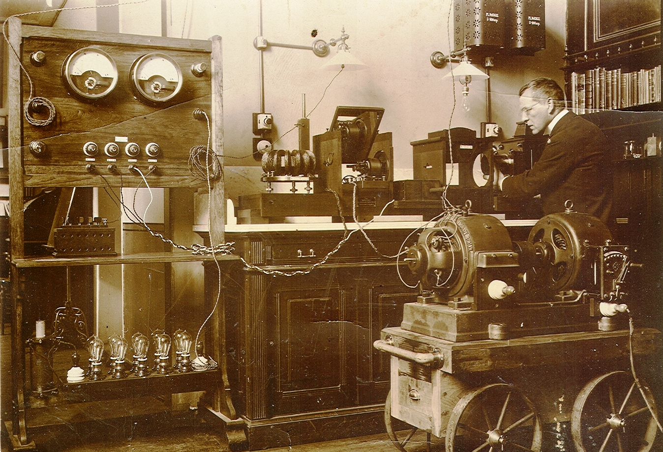 Arturo Salazar trabajando en el laboratorio universitario de la Escuela de Ingeniería